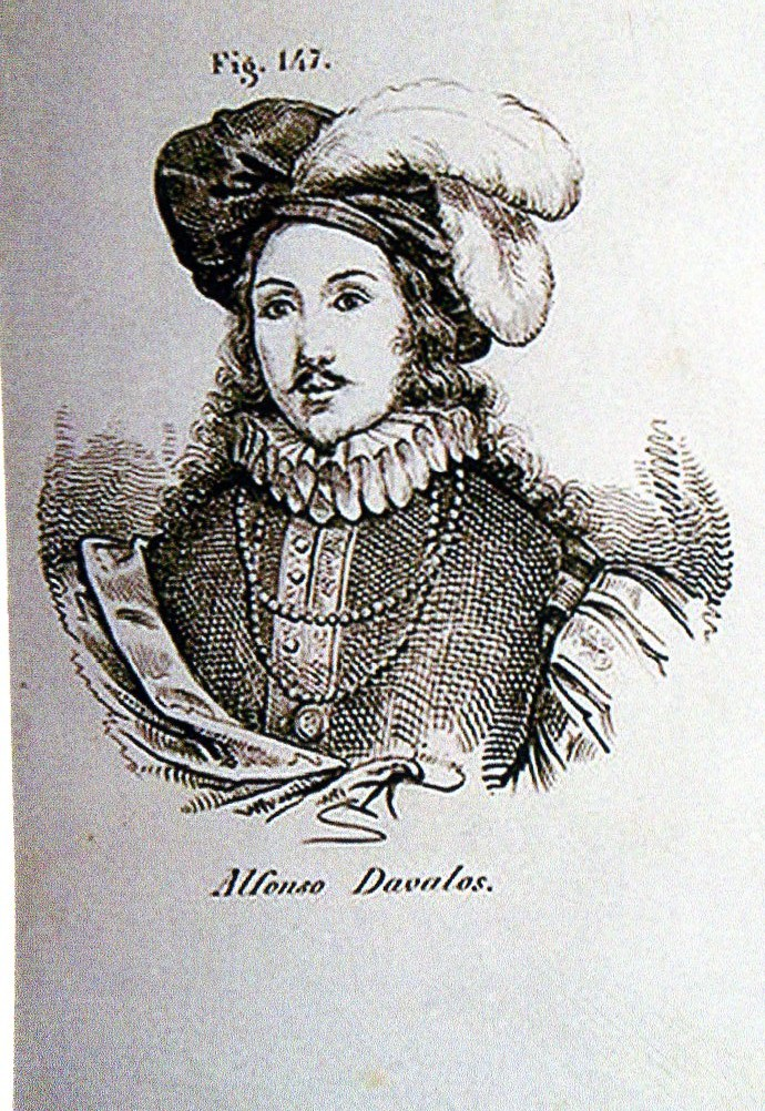 ritratto di Alfonso III D'Avalos (+1546), marchese di Vasto